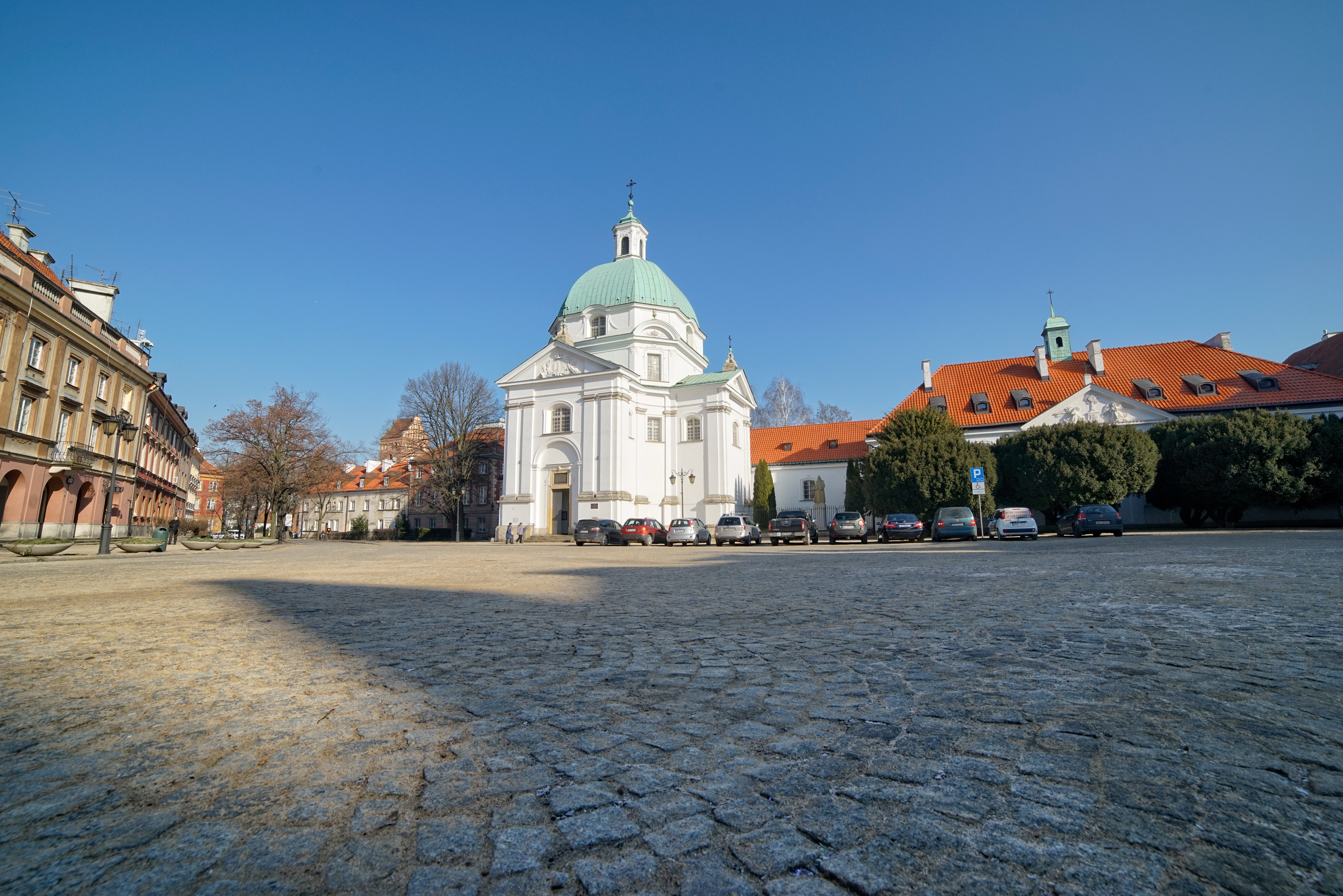 Kościół Sakramentek pod wezwaniem św. Kazimierza – kościół na Nowym Mieście w Warszawie przy Rynku Nowego Miasta 2